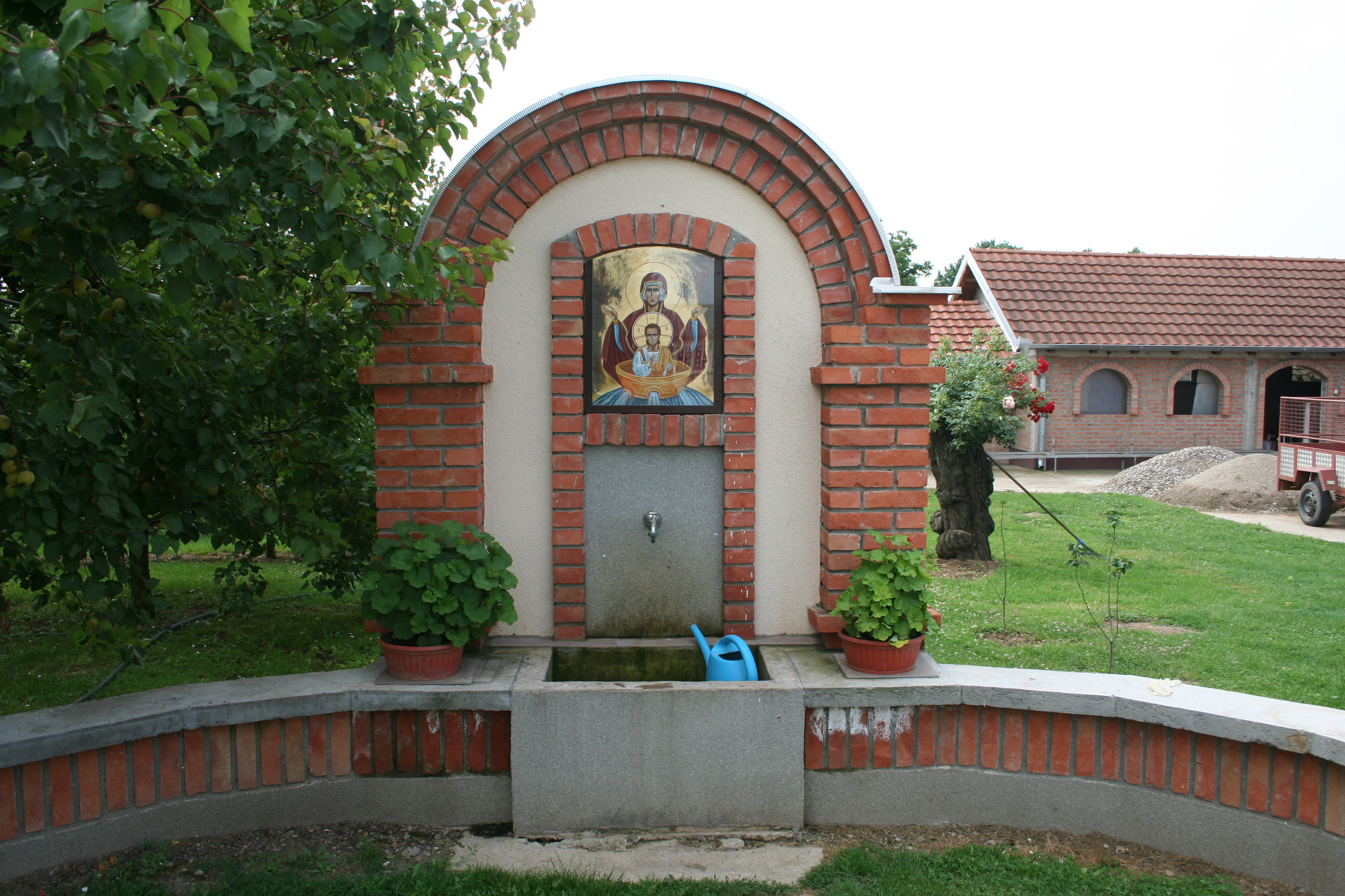 Crkva Svete Trojice u Zasavici II